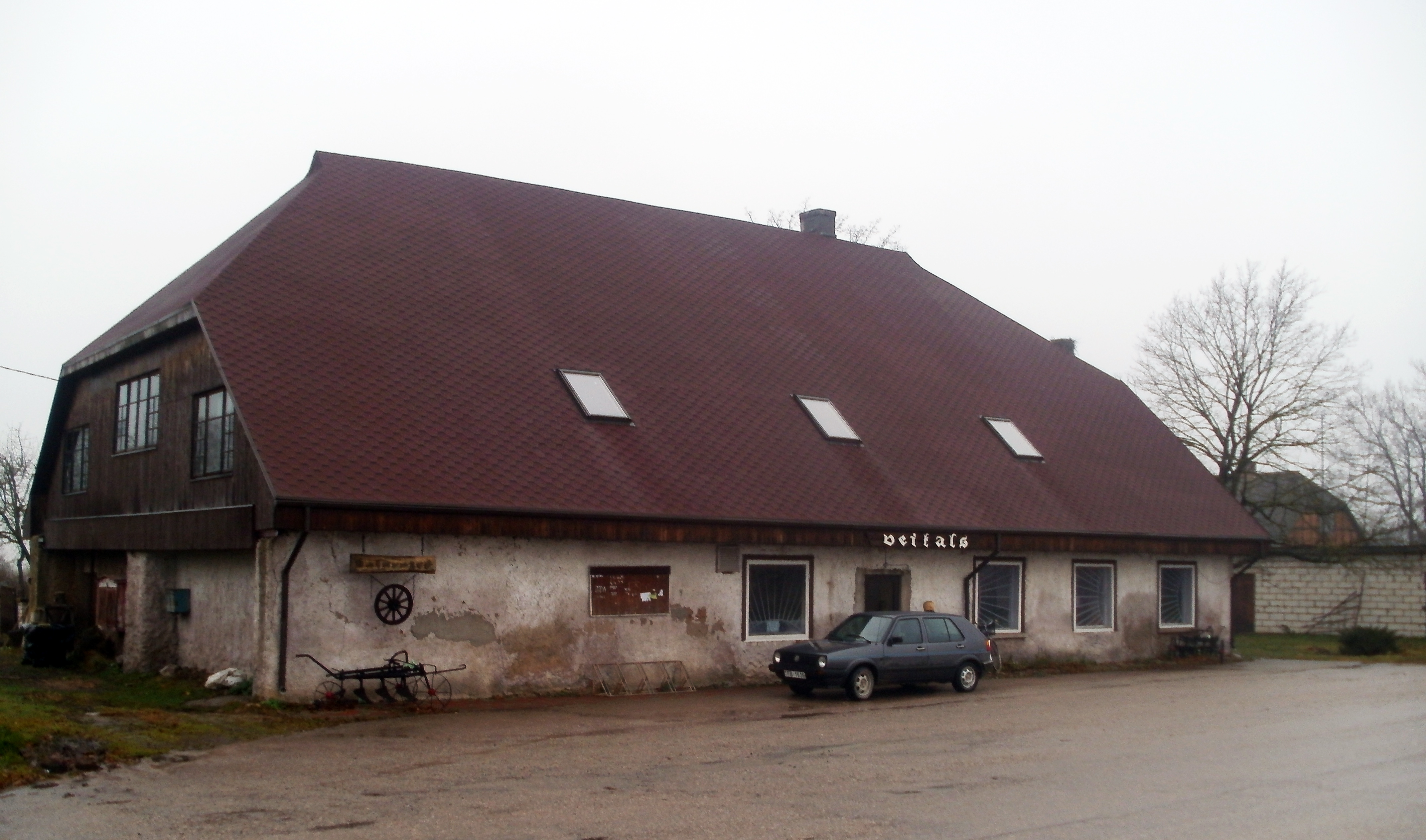 Veikals Kalnrozēs